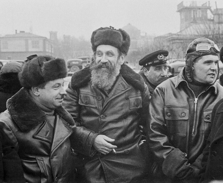 Встреча папанинцев в 1938 году. Слева - Иван Папанин, в центре - Отто Шмидт, справа - Михаил Водопьянов.